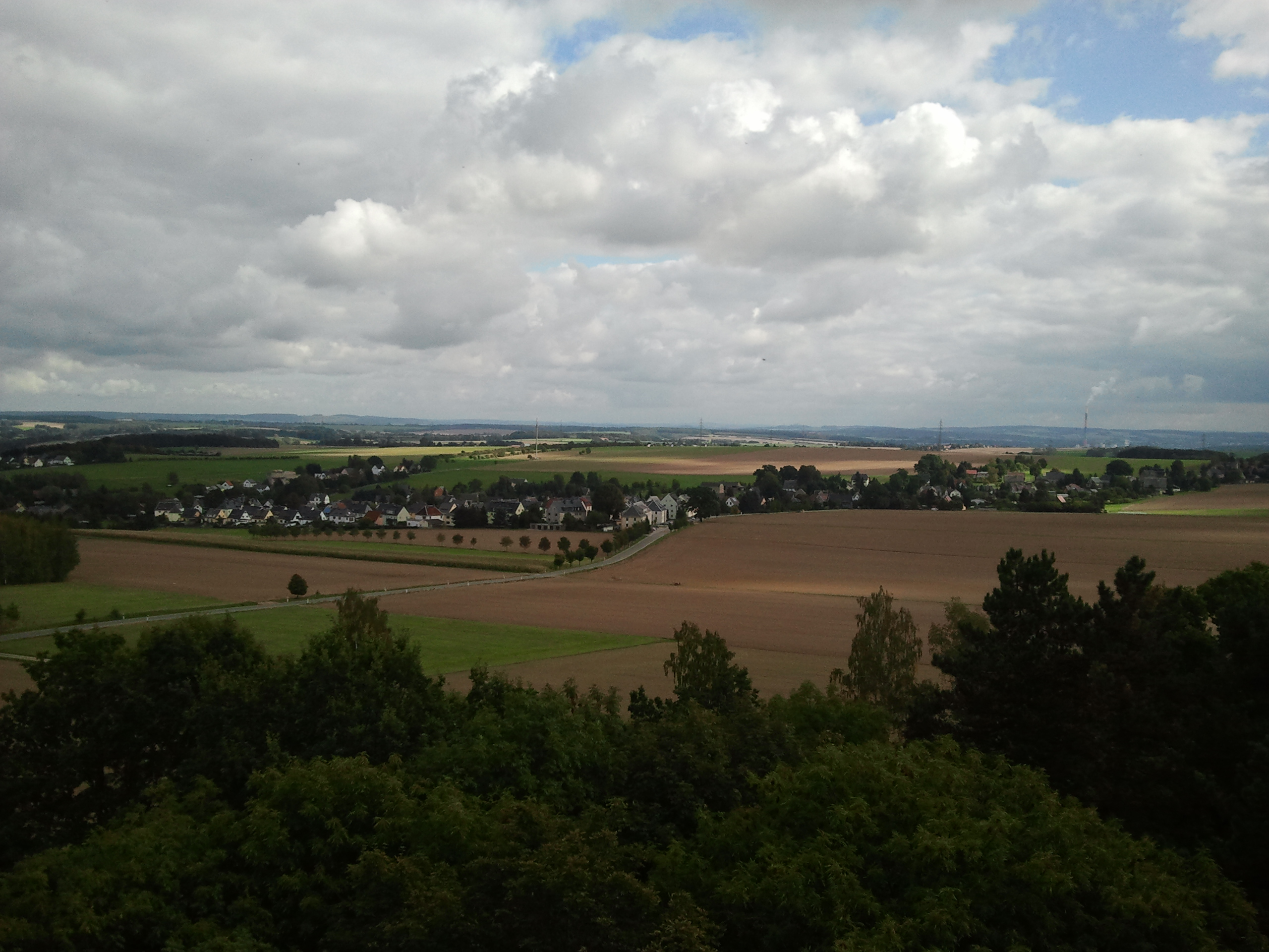 Blick vom Taurasteinturm nach Taura